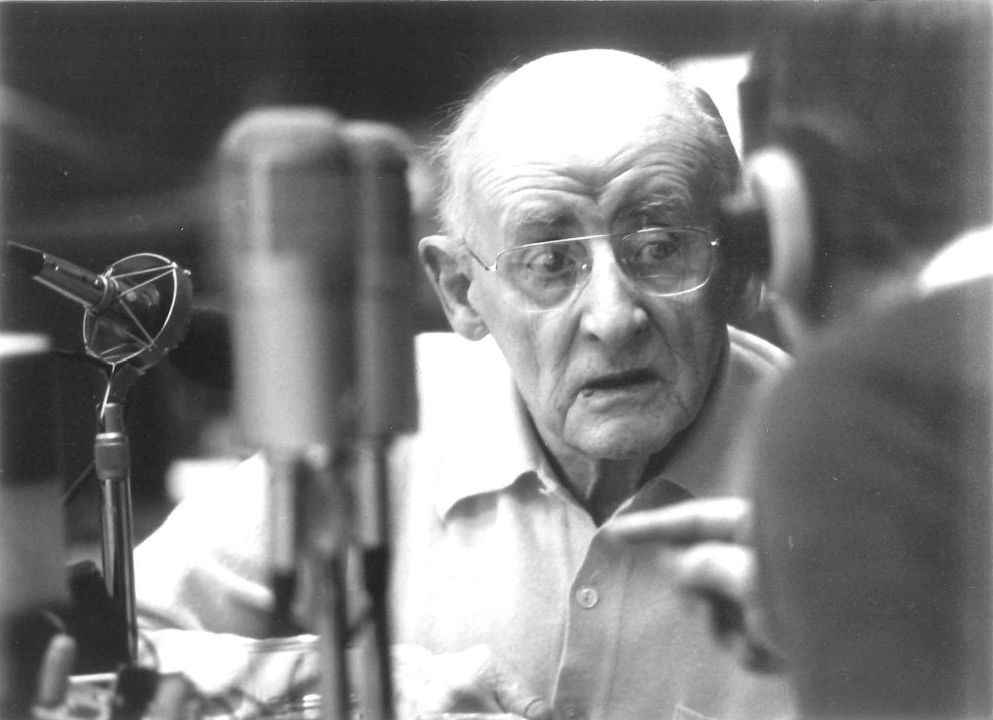 Der Schriftsteller und Radiopublizist Axel Eggebrecht in einem Porträt des Berliner Fotografen Werner Bethsold.